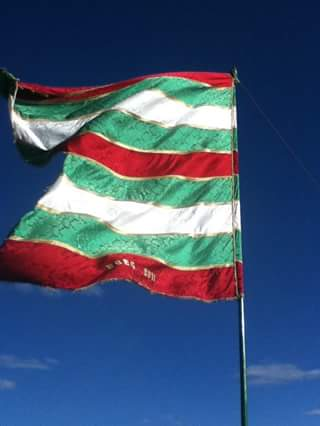 Pnedón de huerga de garaballes, León